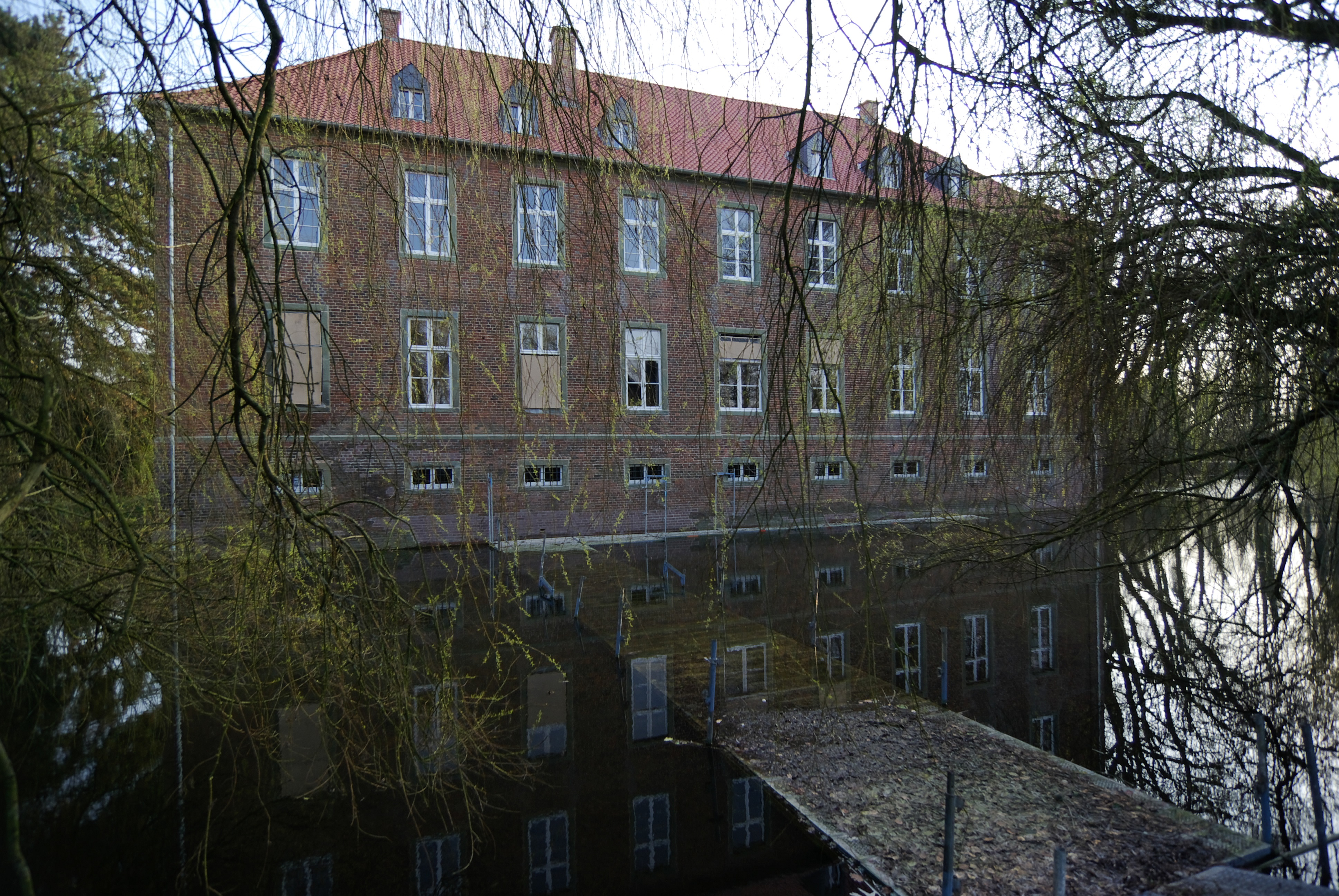 Haus Uentrop, Wasserschloß in Uentrop, Nordrhein-Westfalen